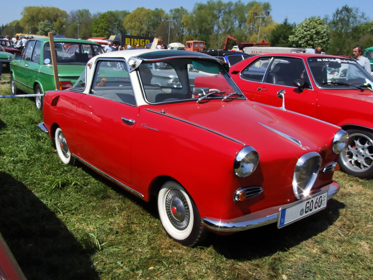 Quelle: selbst fotografiert, 04/2007 Fotograf: Späth Chr.